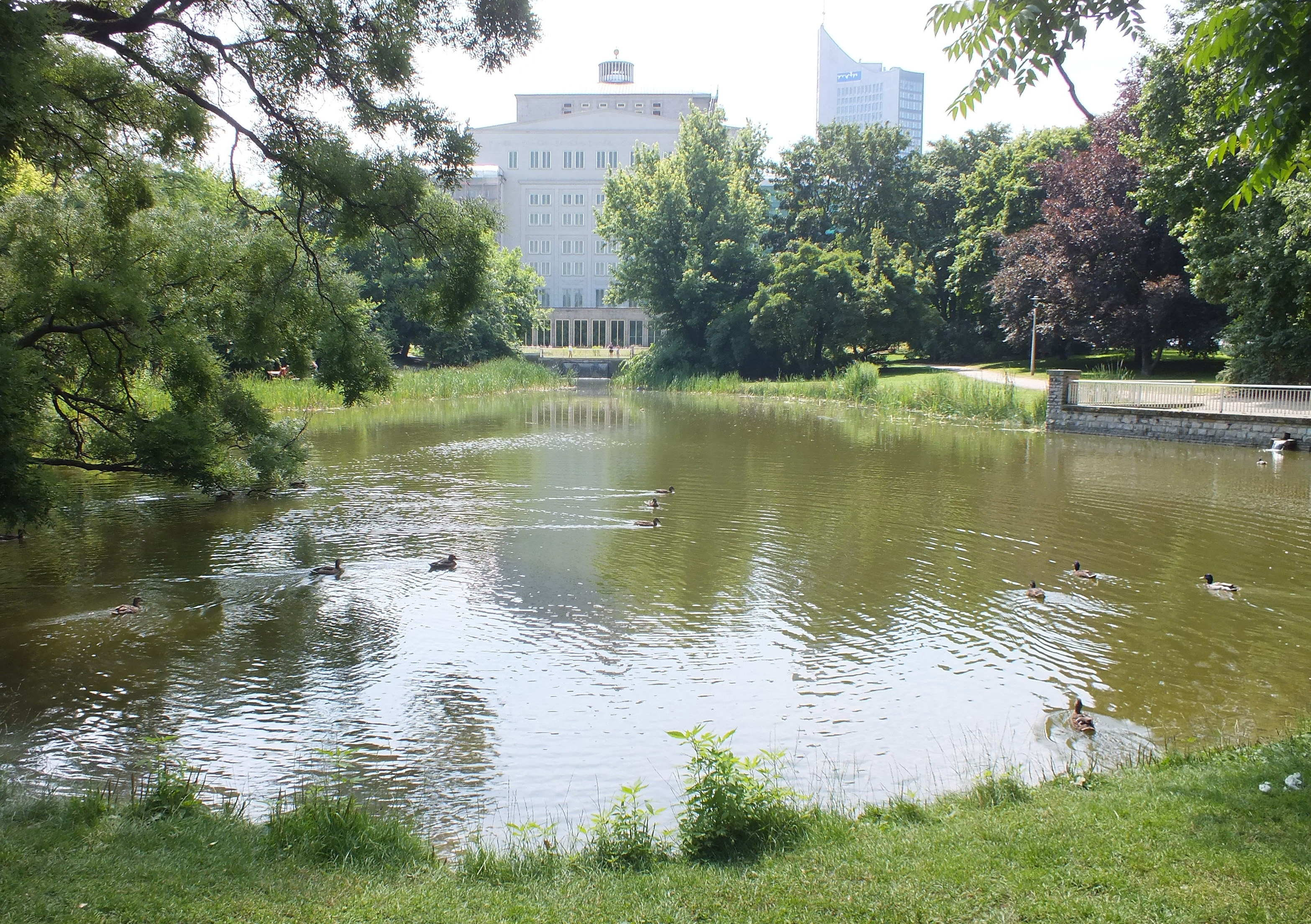 Der Schwanenteich in Leipzig mit umgebender Parkanlage